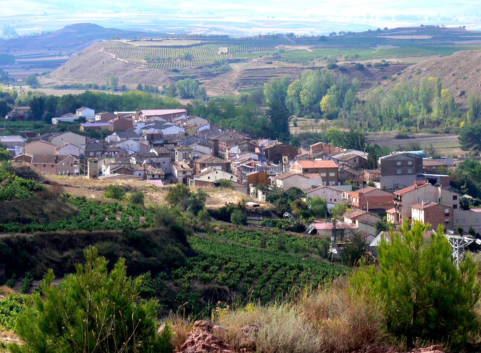 Vista de Cárdenas en La Rioja (España).